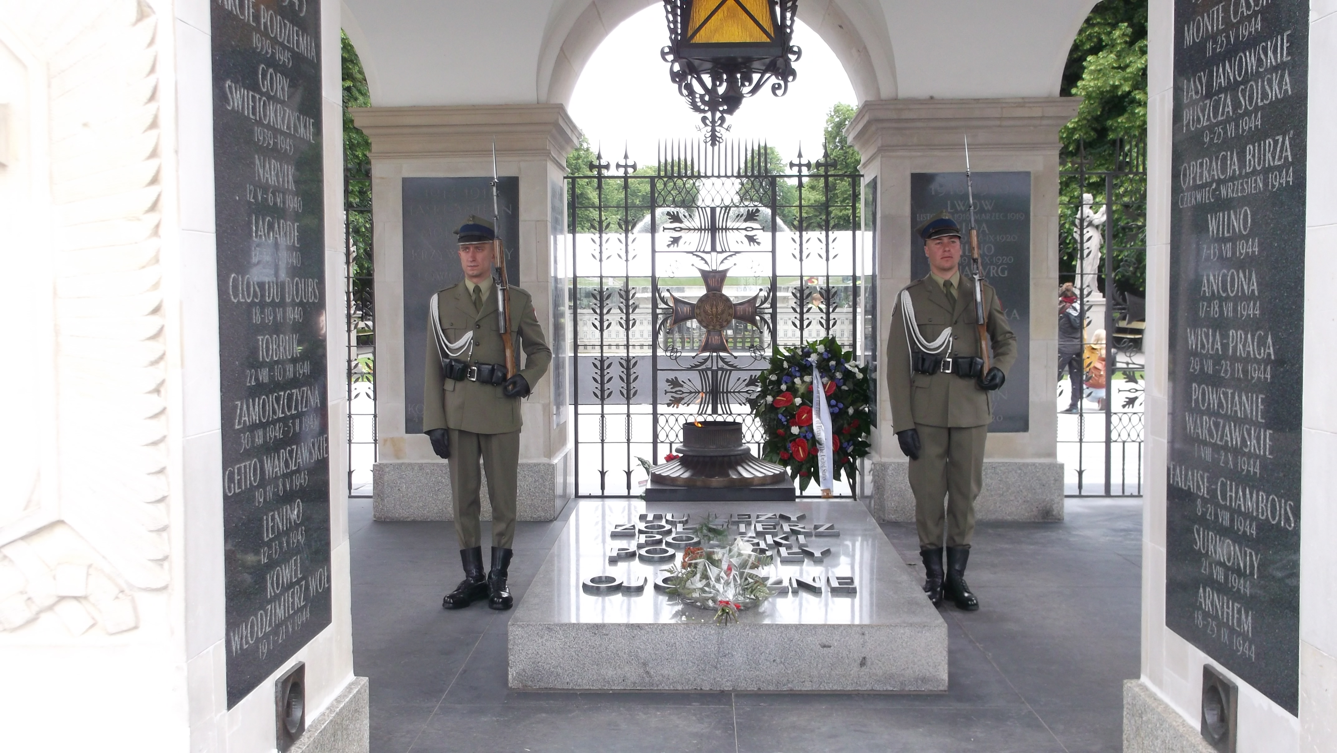 Warszawa, Grób Nieznanego Żołnierza